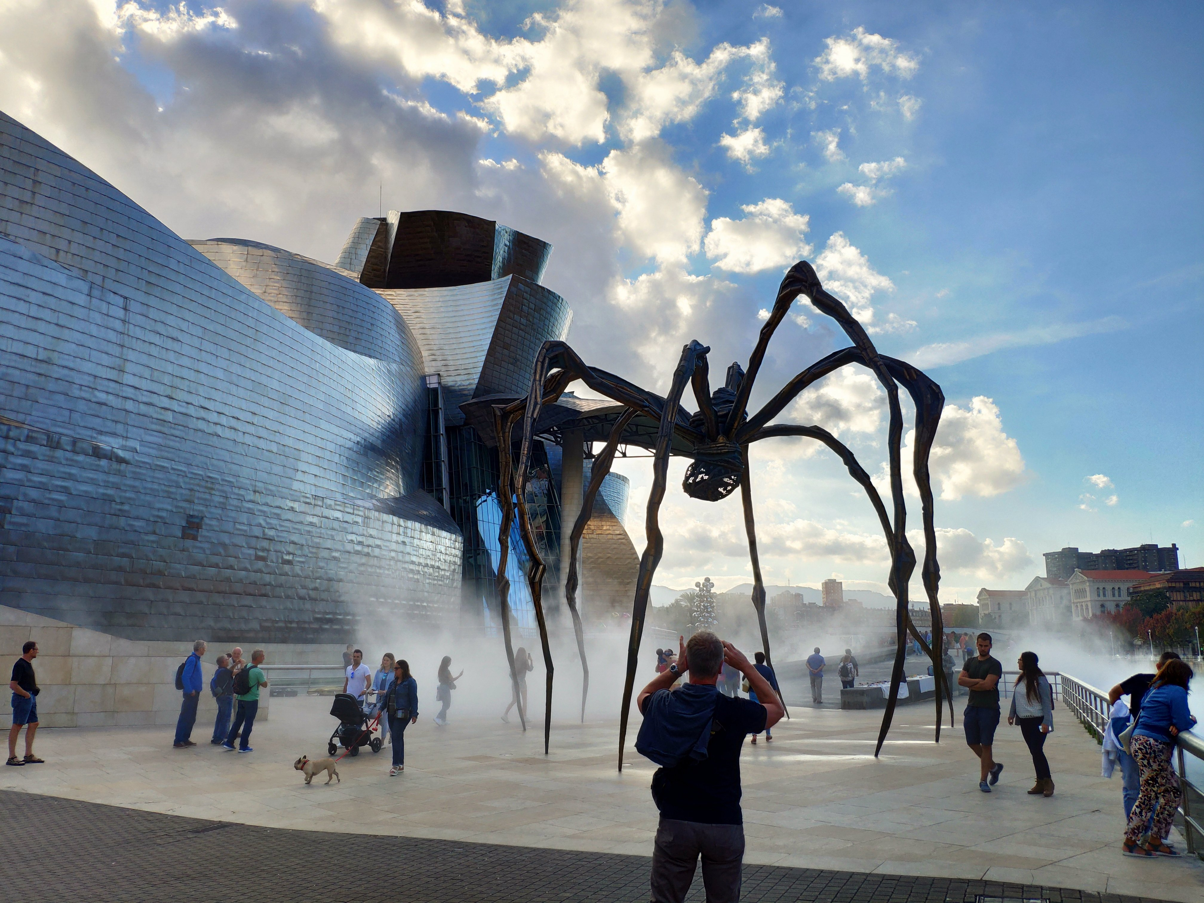 Un buen día